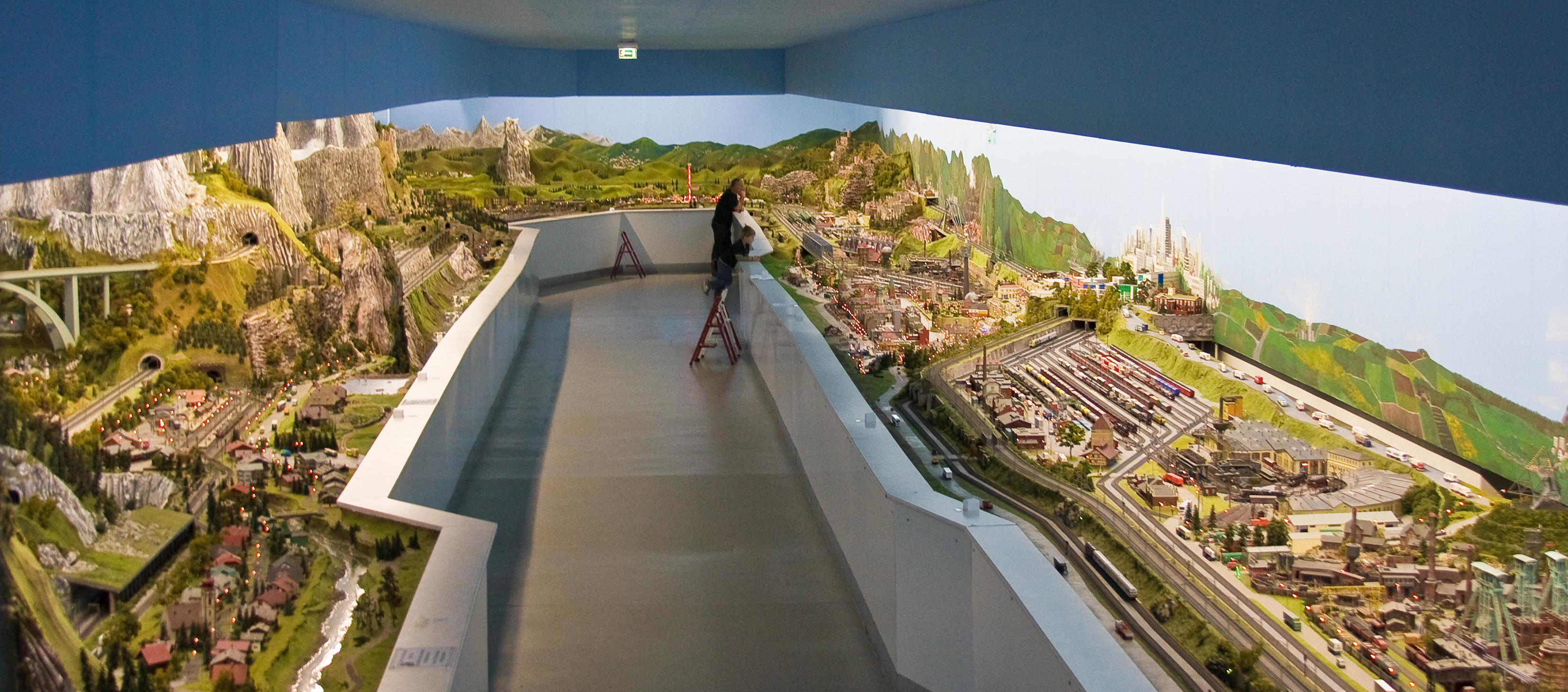 Ausschnitt über die Anlage